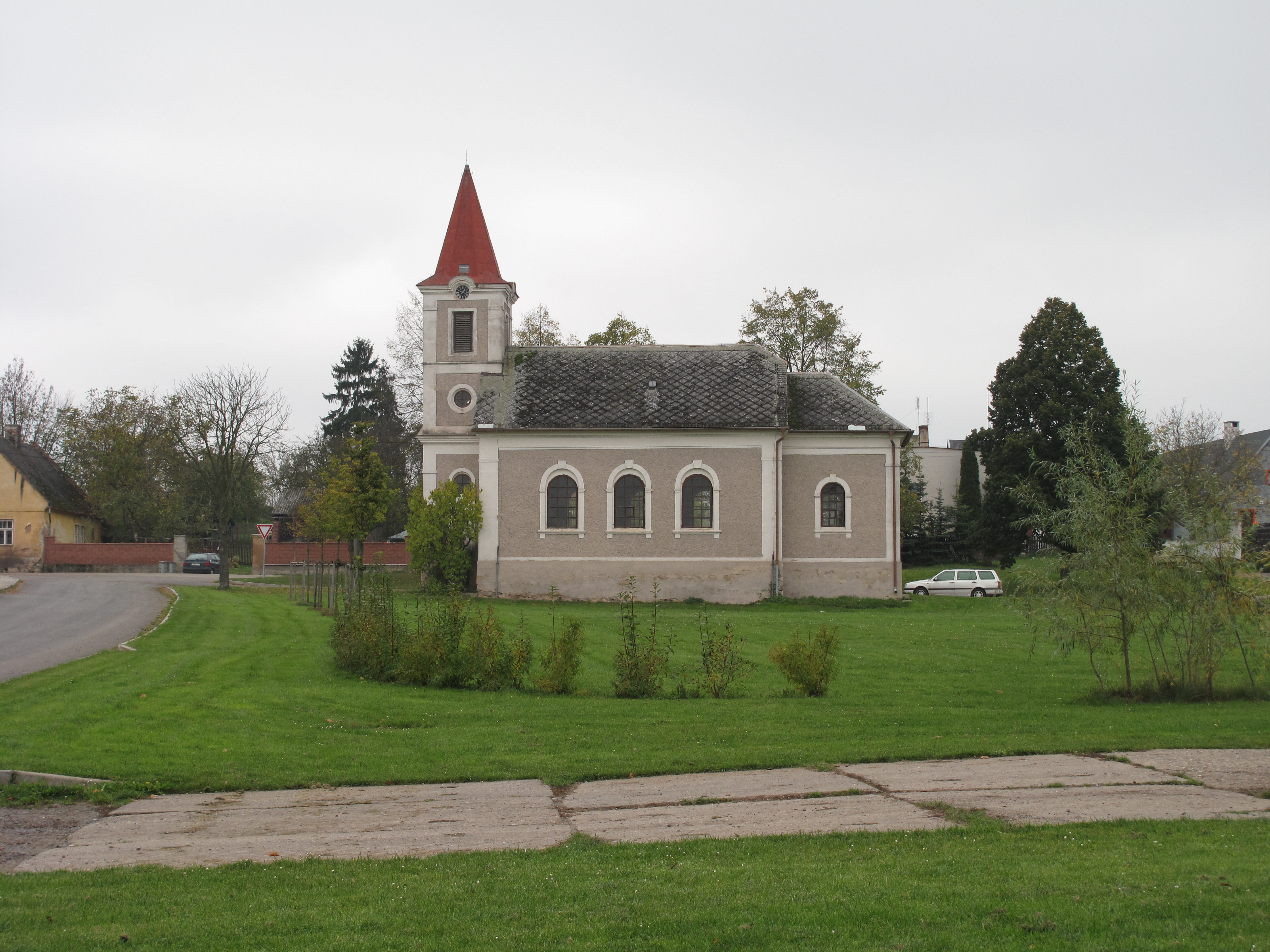 Kostel v Pšově. Okres Karlovy Vary, Česká republika.